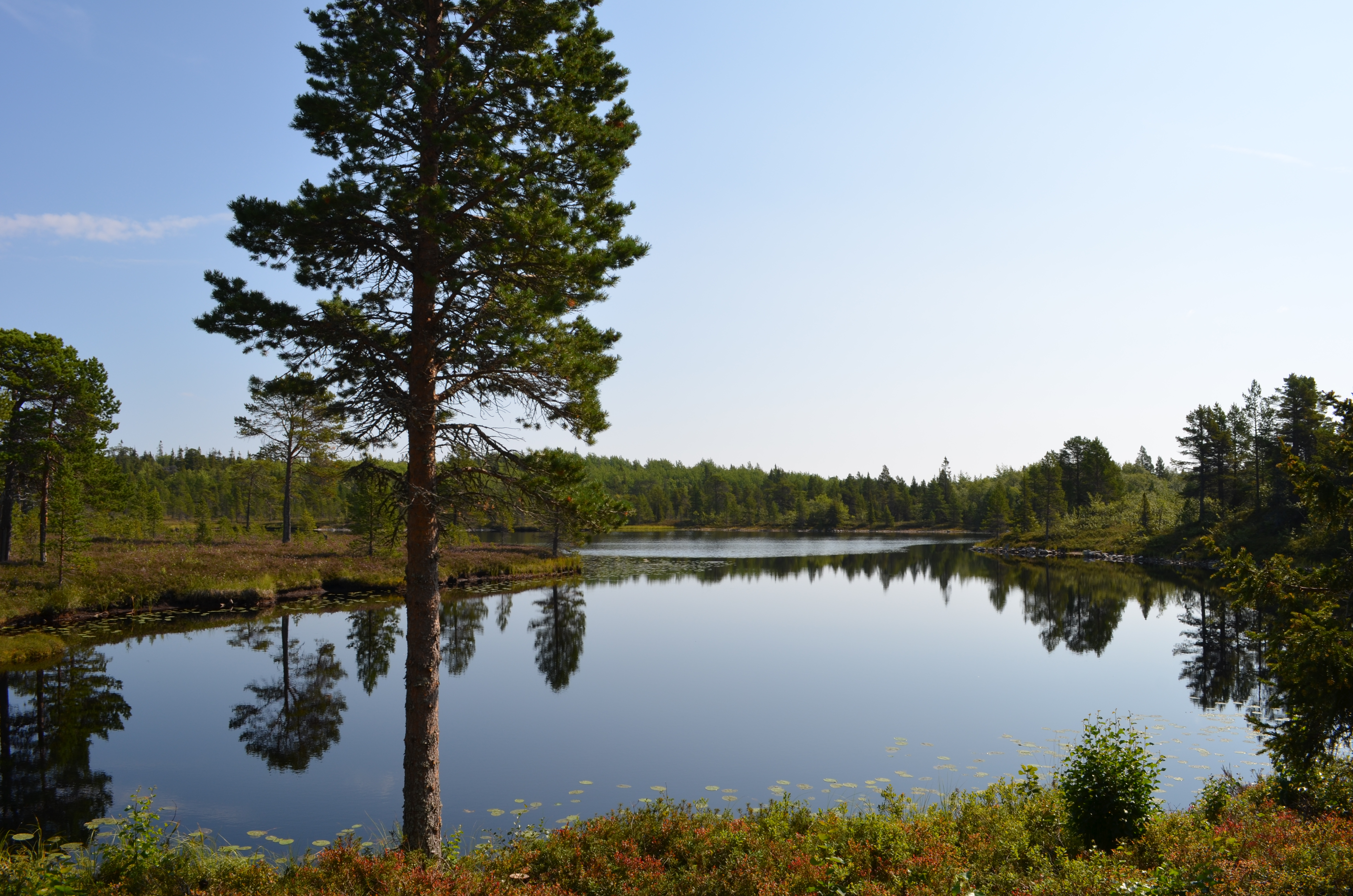 Острів Анзерський